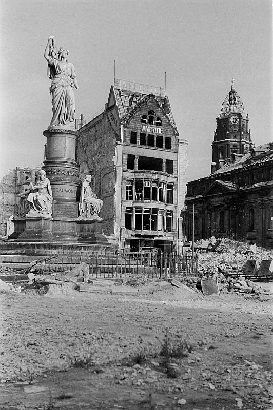 Original image description from the Deutsche FotothekAnsicht mit Siegesdenkmal, Kreuzkirche und Rathausturm